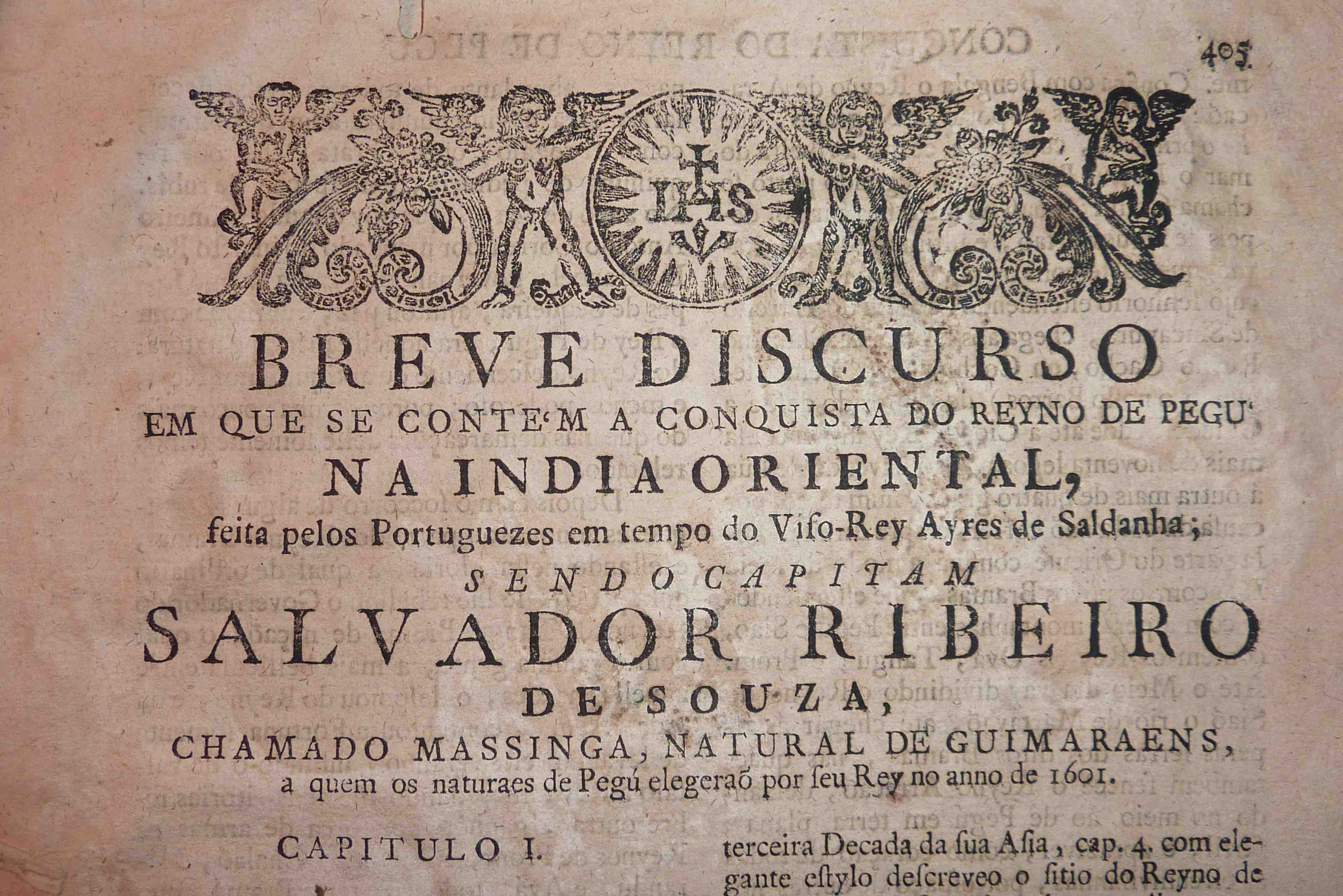 Bref discours sur Salvador Ribeiro de Sousa élu roi du Pegu en 1601